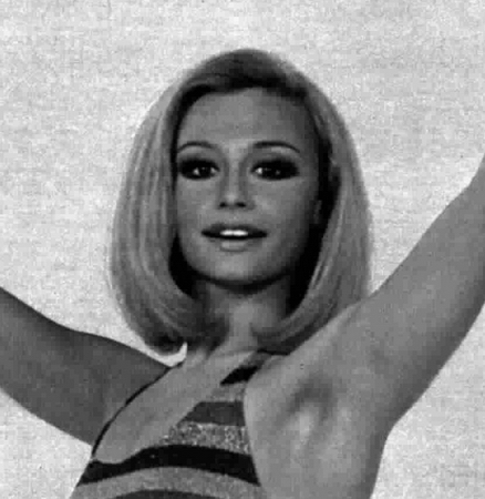 Italian presenter Raffaella Carrà